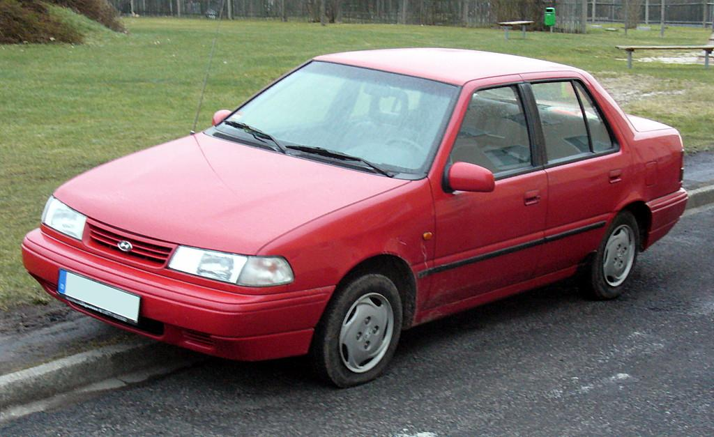 Hyundai Pony SE